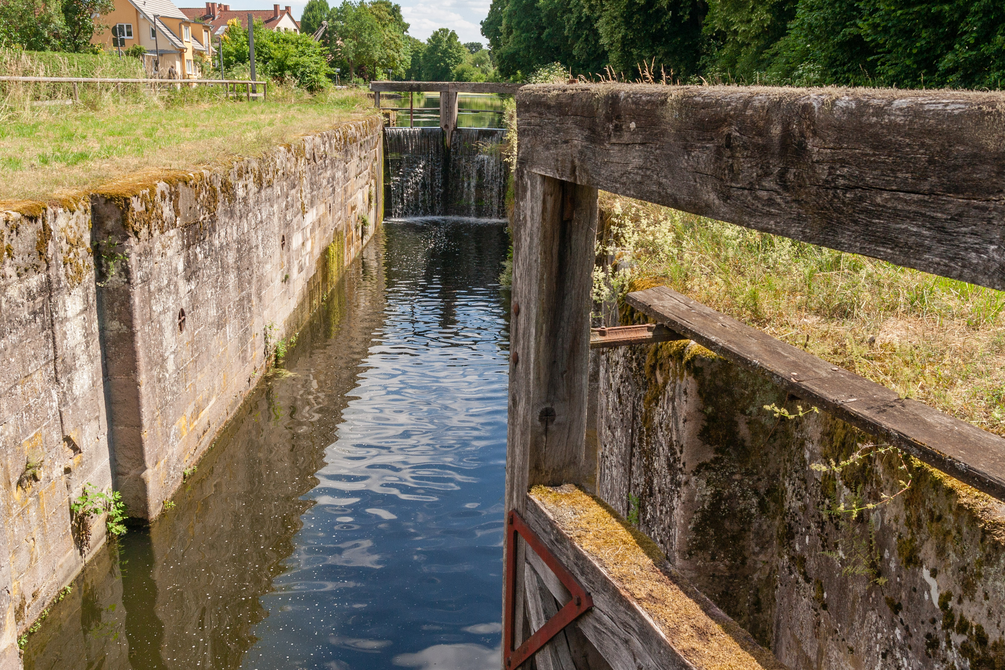 Ludwig-Donau-Main-Kanal, Nürnberg, Schleuse 68